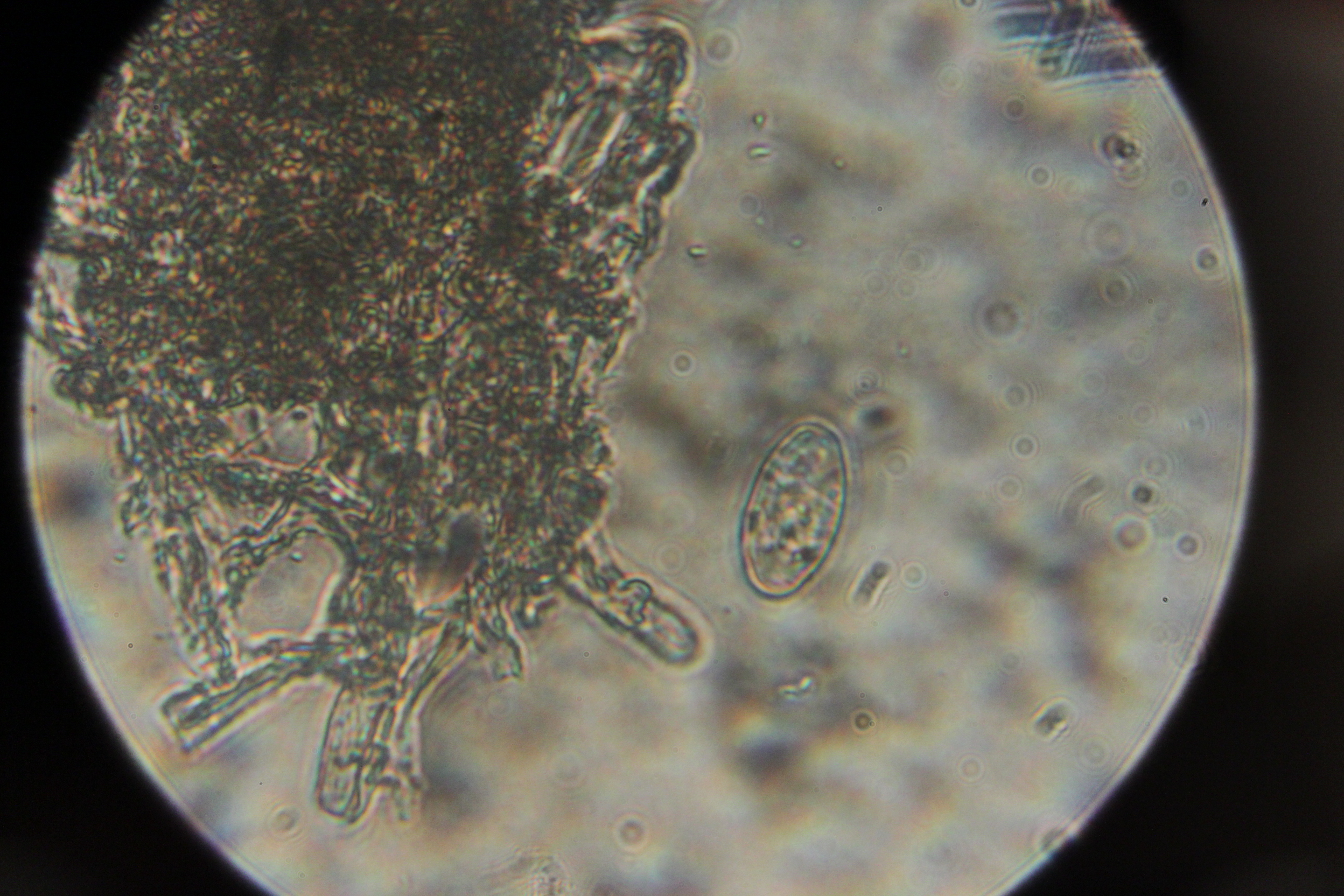 Podosphaera plantaginis on Ribwort Plantain - Plantago lanceolata